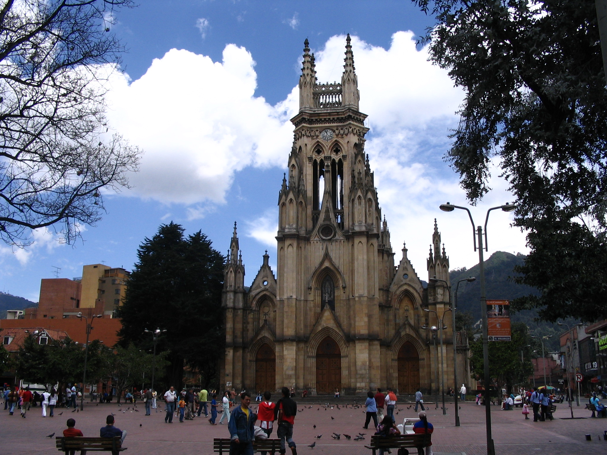 Iglesia de Lourdes, Barrio Chapinero, Bogotá. Fotografía tomada por Tequendamia para la wikipedia.